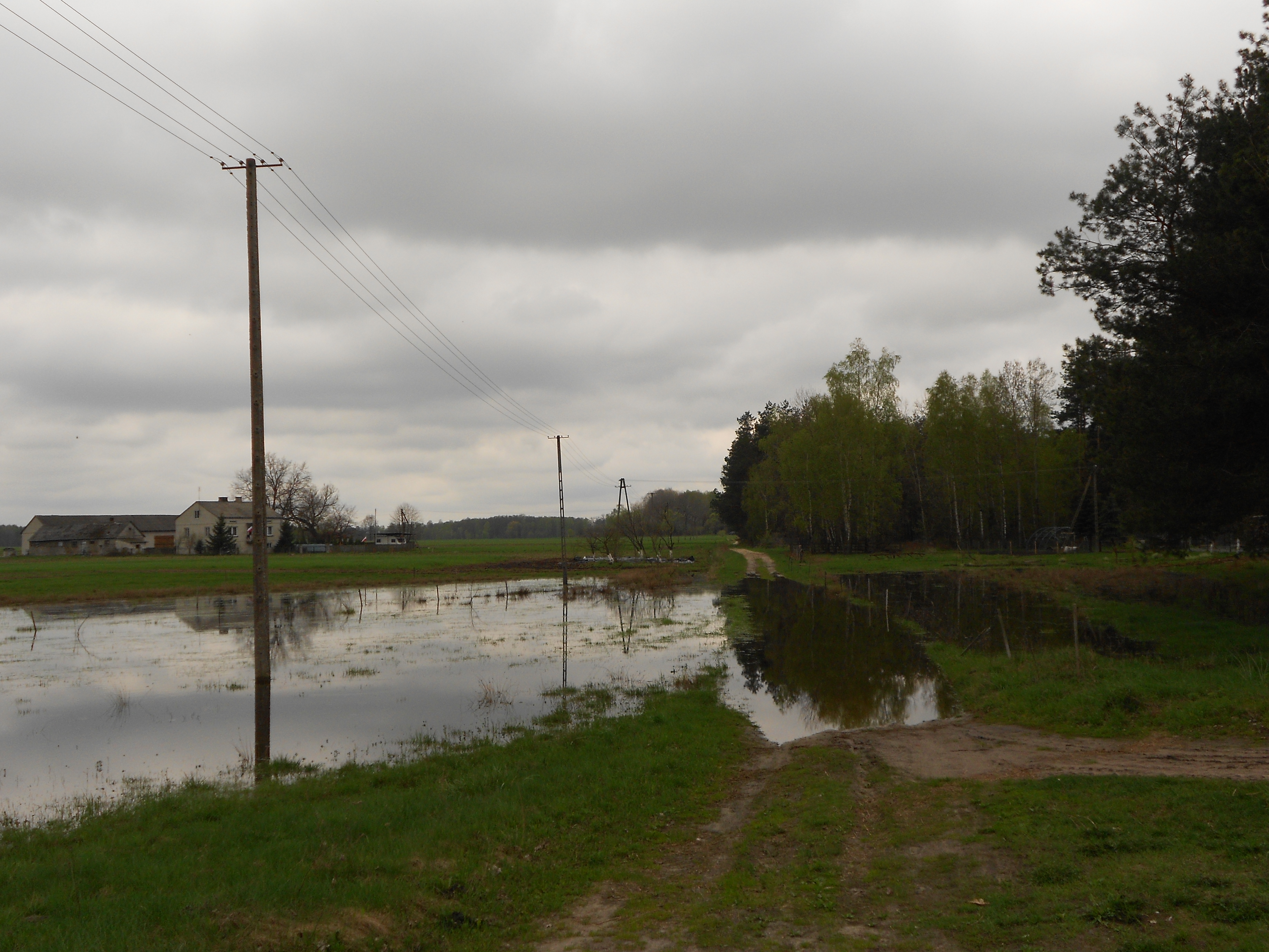 Świdno zalane podczas wiosennych opadów